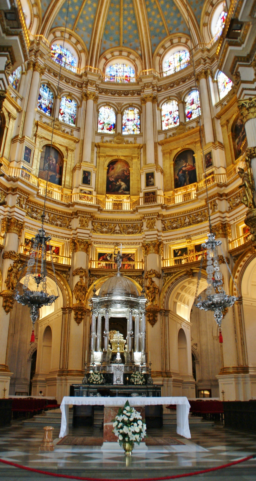 La Iglesia Catedral de la Encarnación de Granada, es una de las obras cumbres del renacimiento español del siglo XVI. Granada, Comunidad Autónoma de Andalucía.